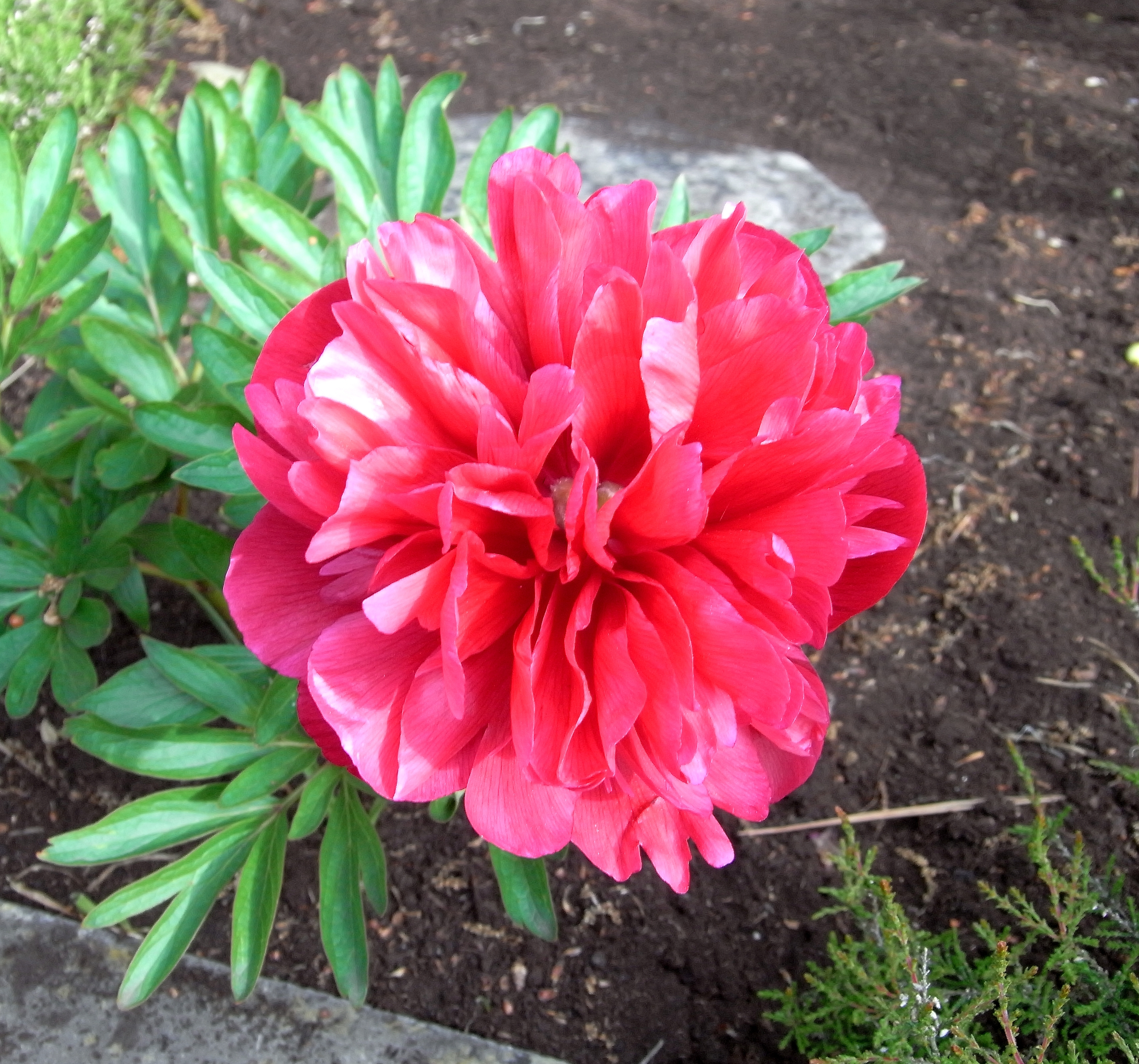 Paeonia × festiva 'Rubra Plena'